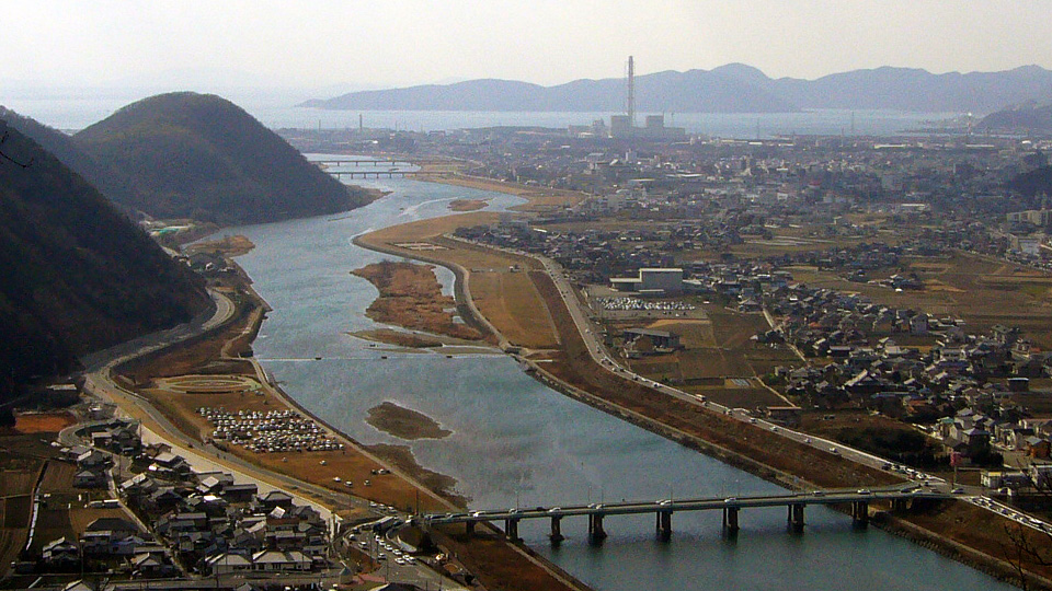 Chikusa river at Sakoshi in Ako, Japan